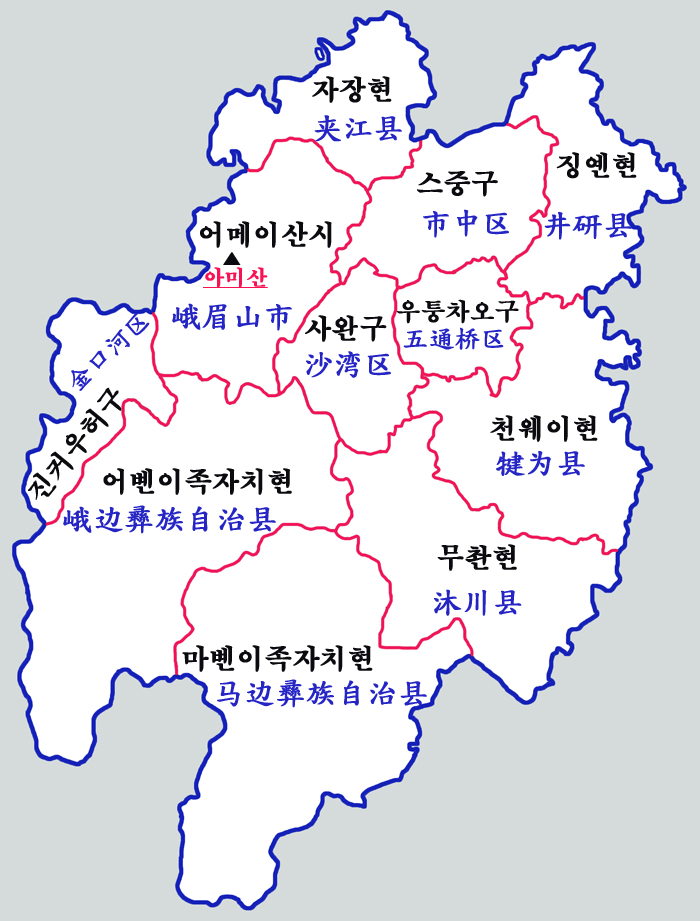 러산시현급행정구역도